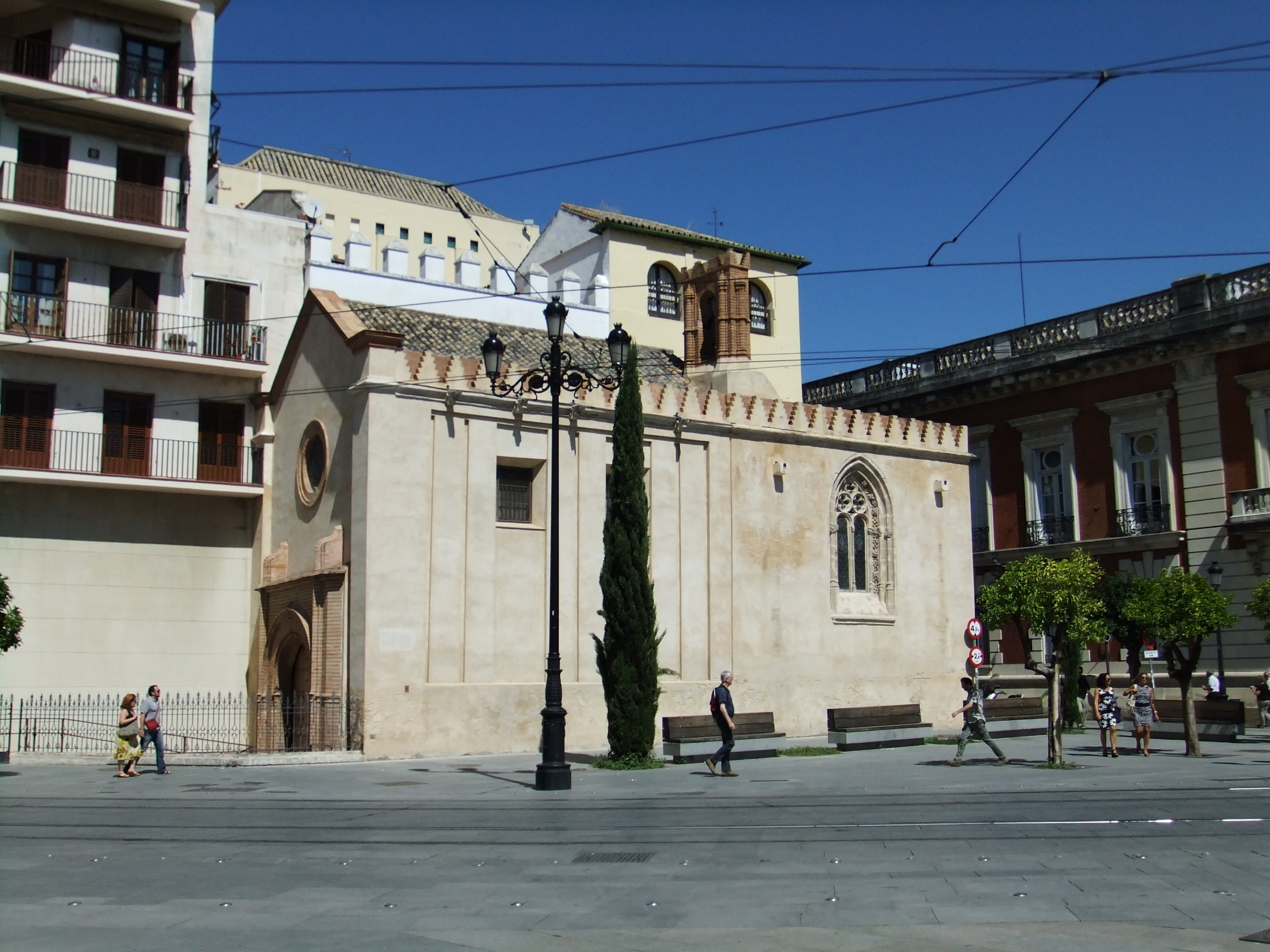 Lateral de la Capilla de Santa María de Jesús, en la Puerta de Jerez de Sevilla; construida a principios del siglo XVI para la primitiva Universidad de Sevilla.